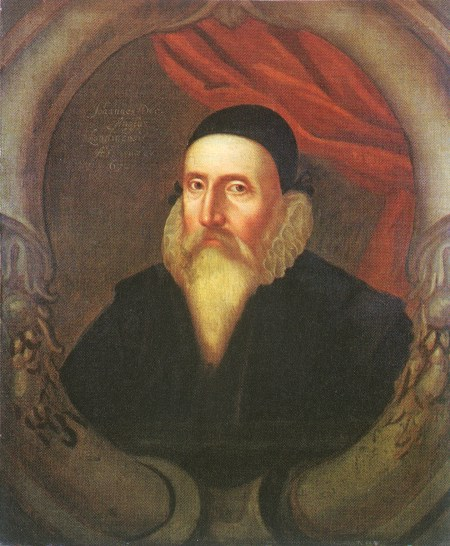 John Dee